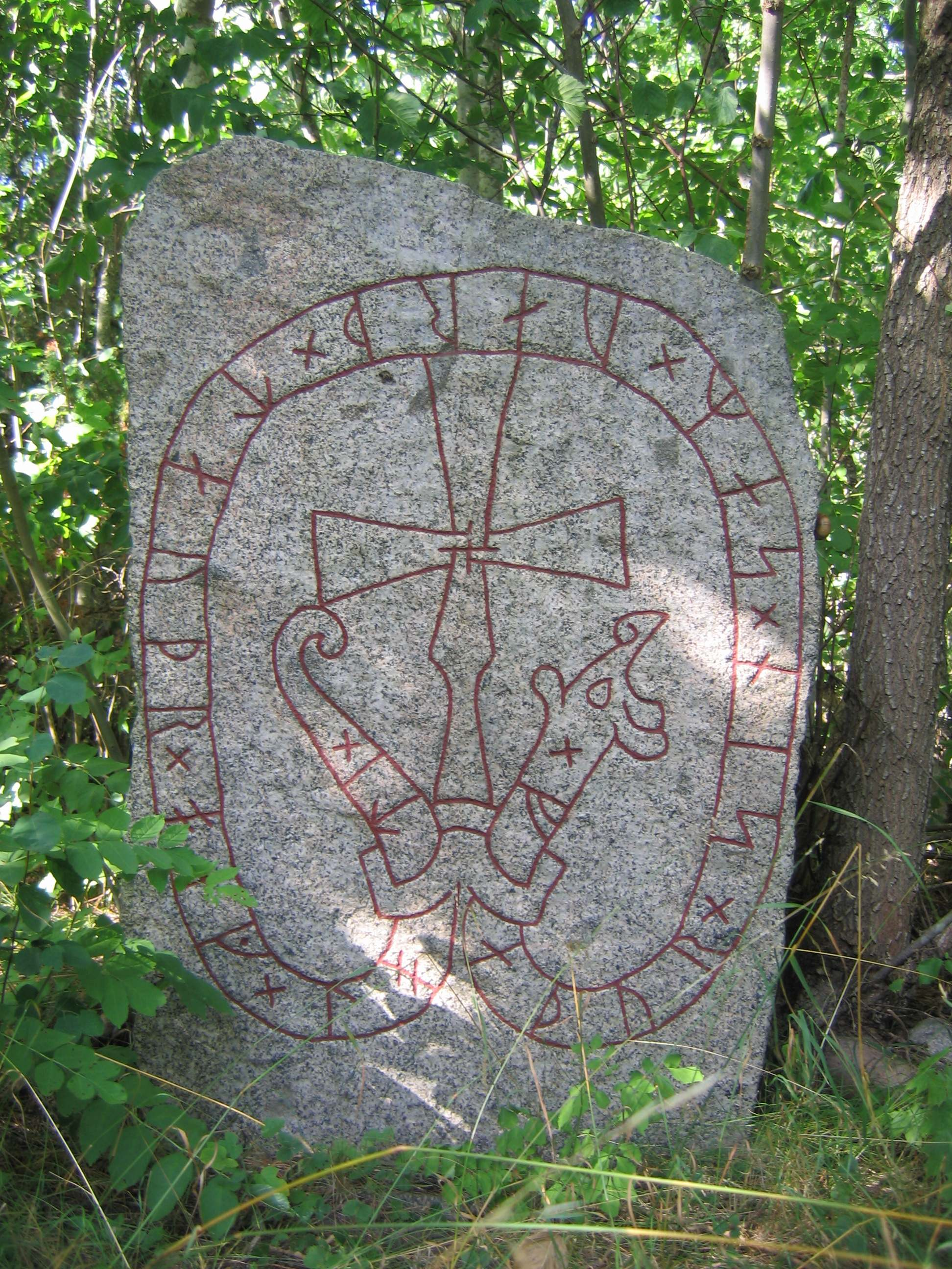 Runestone